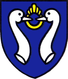 Wappen des Erfurter Ortsteils Molsdorf